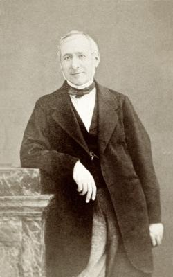 Moquin-Tandon (1801-1863)